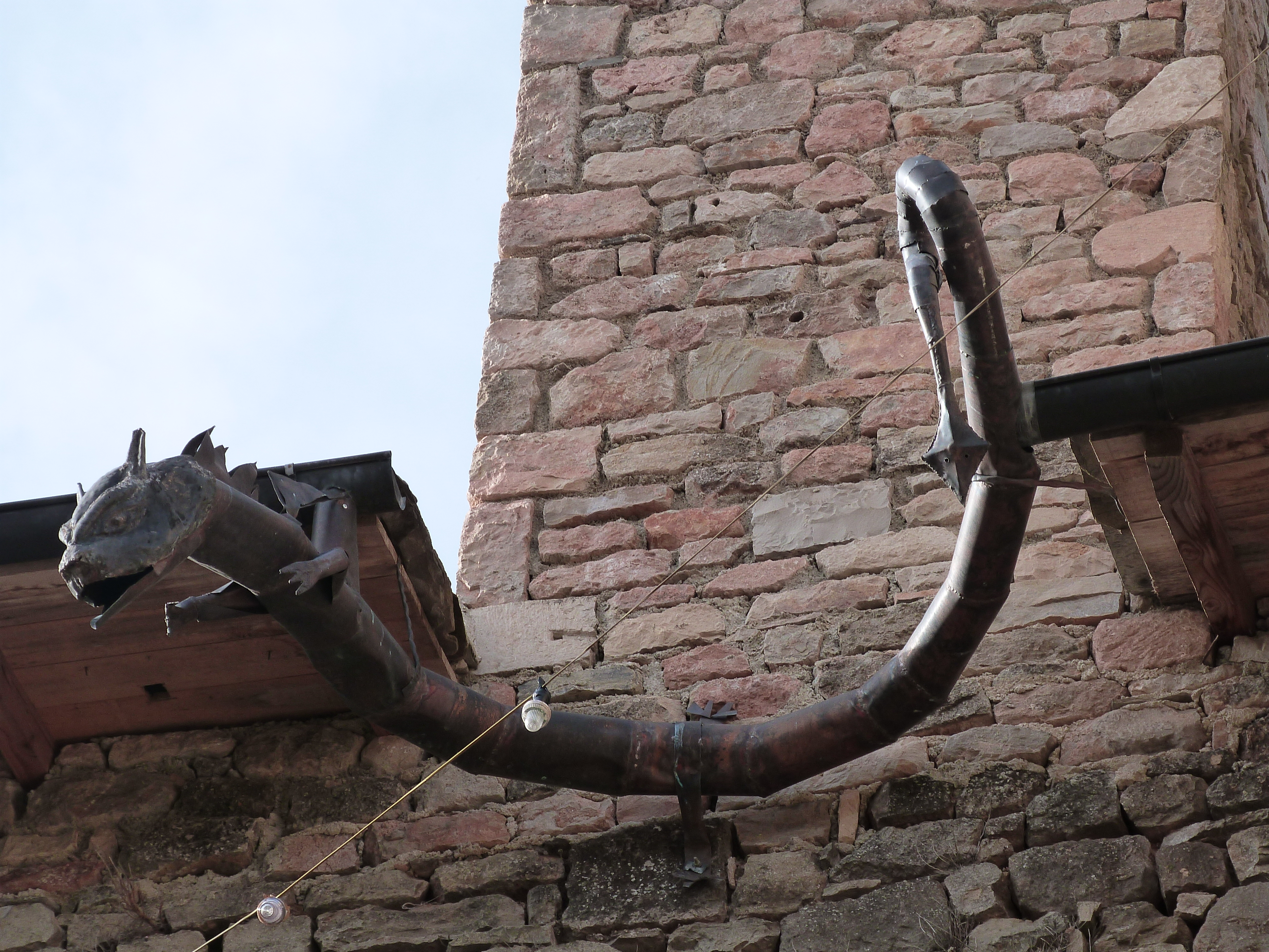 Ce dragon est affecté à l'évacuation des eaux de pluie de la toiture du château récupérées par la gouttière.